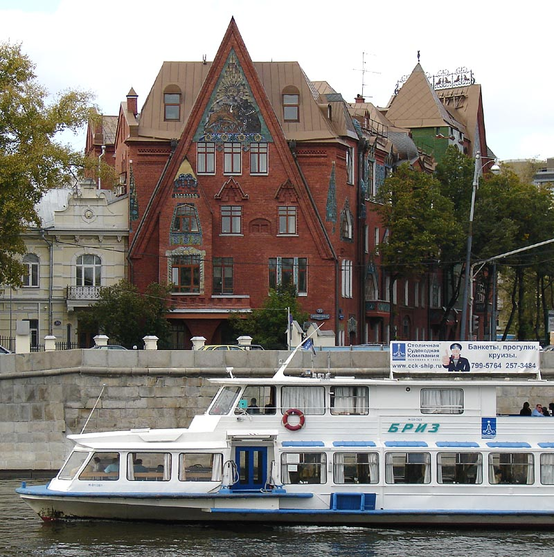 Pertsov Building, 1906-1910, Prechistenskaya Embankment, Moscow, Russia